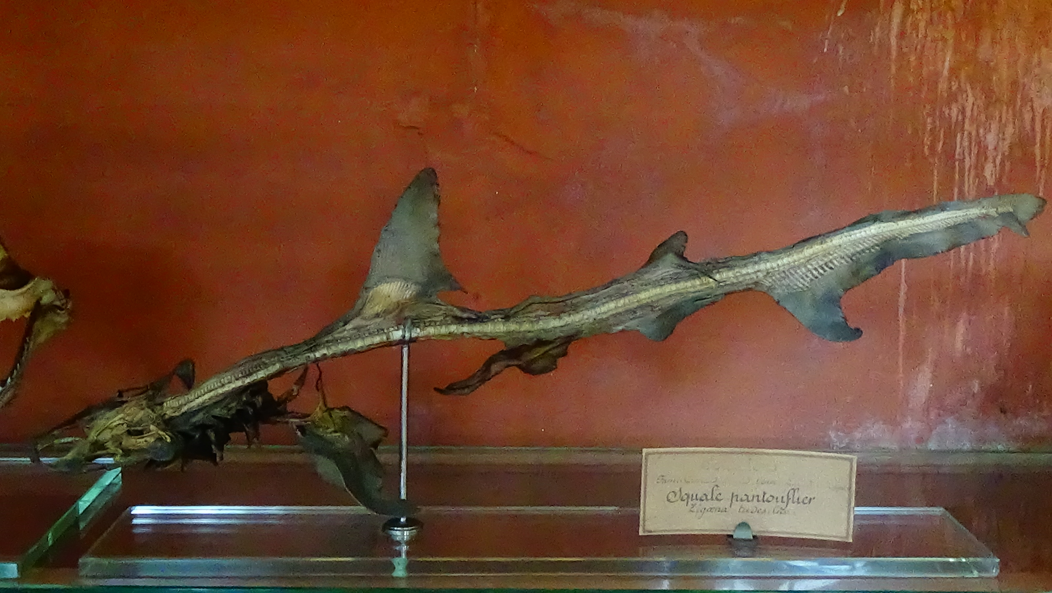 Sphyrna tudes - Zygaena tudes - Squale pantouflier - Requin-marteau à petits yeux - squelette mnhn Paris